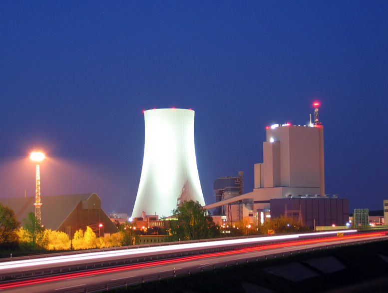 Steinkohlekraftwerk Rostock bei Nacht